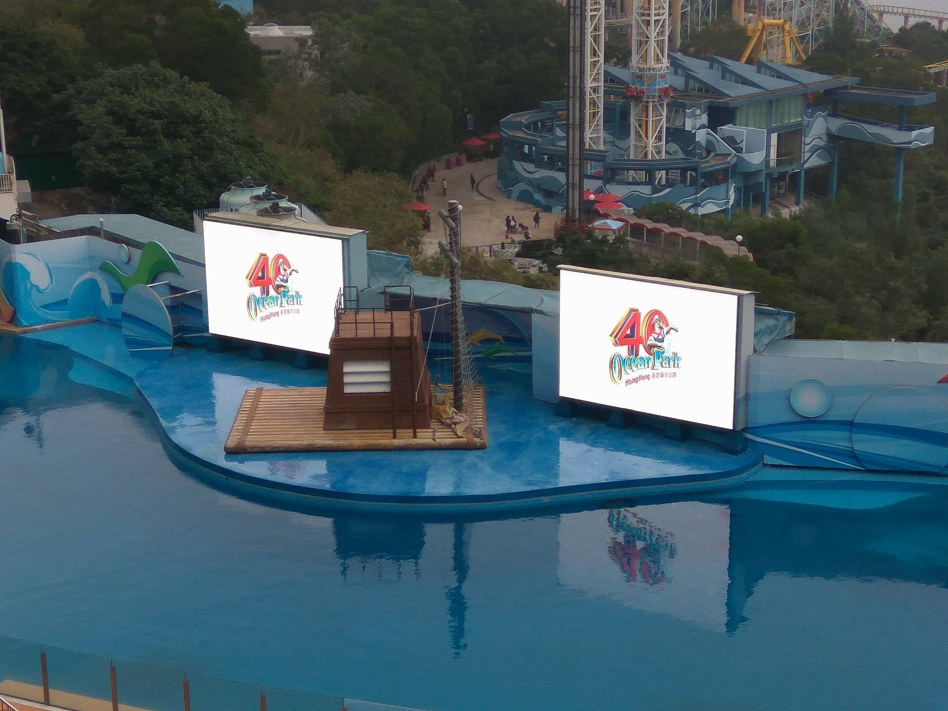 香港海洋公園40週年標誌於海洋劇場中顯示